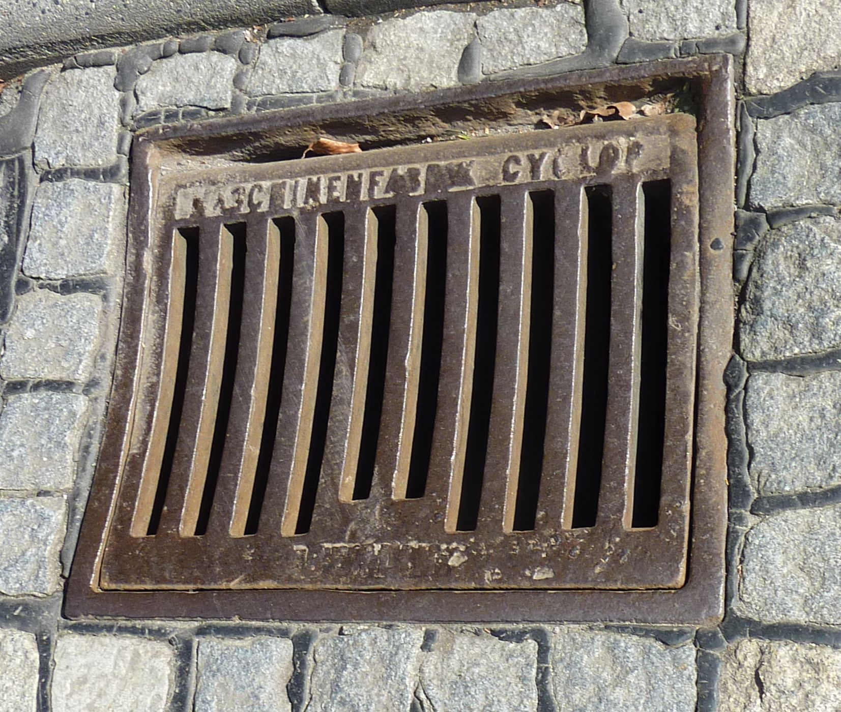 Schachtdeckel in der Wilhelm-Külz-Str., Halberstadt